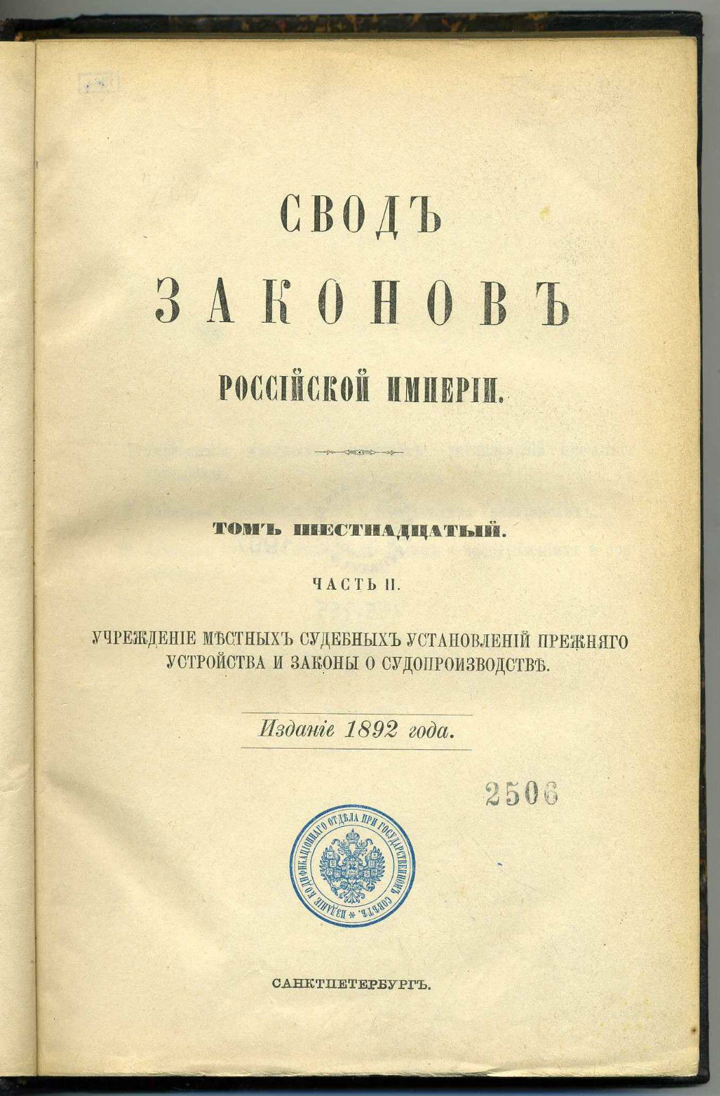 Свод законов (ч. 2 том XVI)